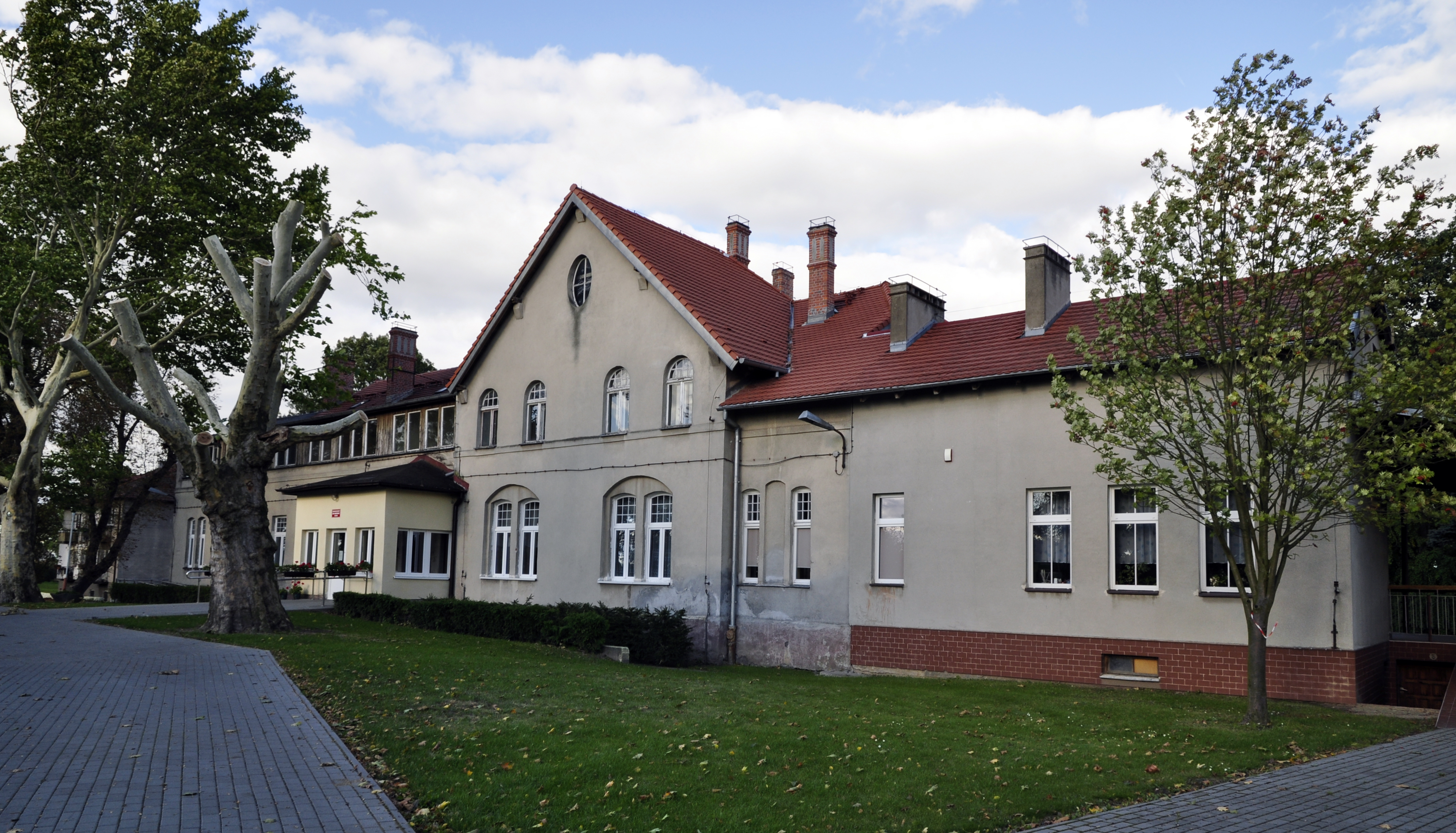 Gądecz - zespół dworski, 4 ćw. XIX w.: dwór